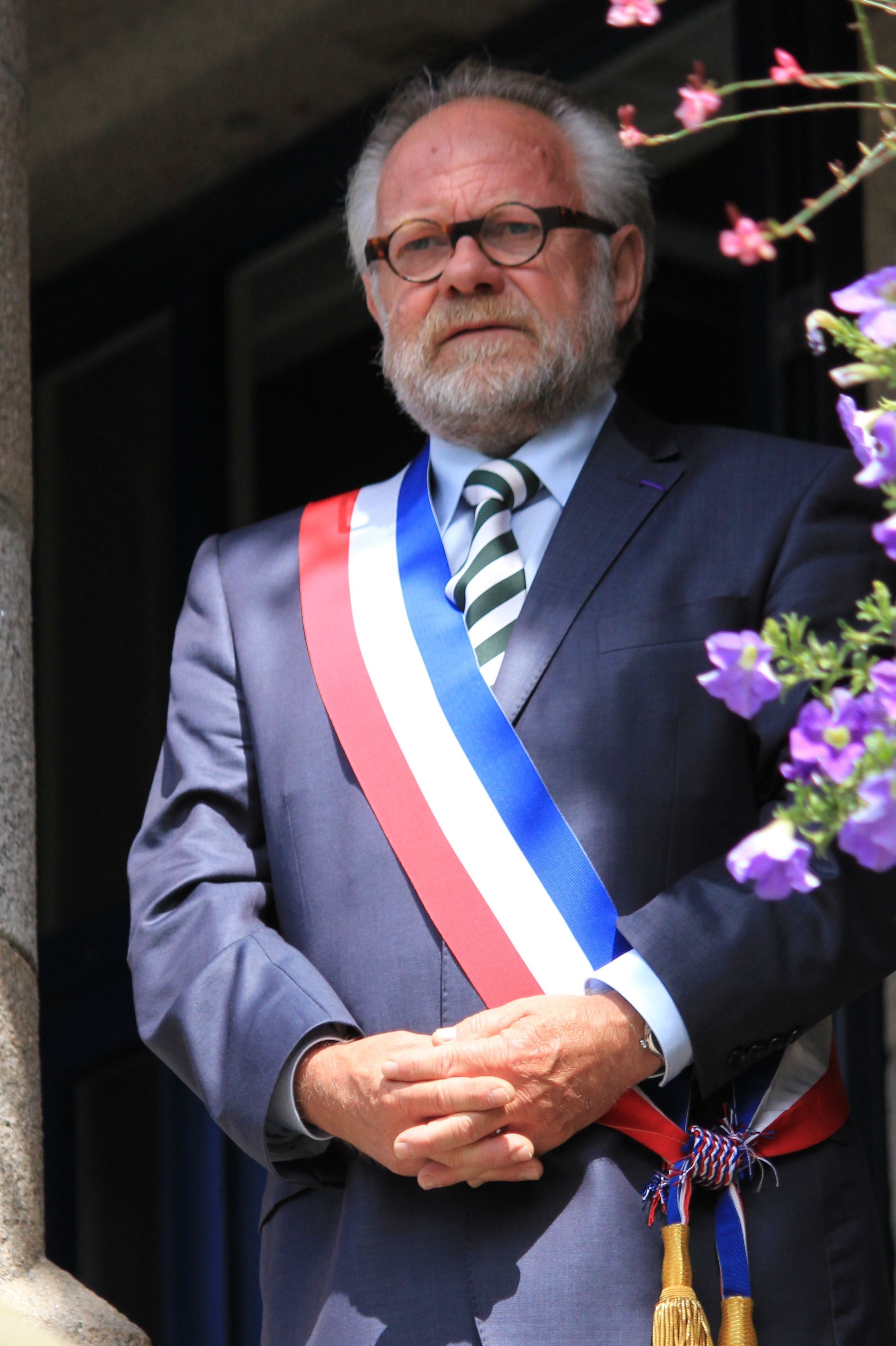 Le maire de Pléneuf-Val-André, Jean-Yves Lebas en 2013